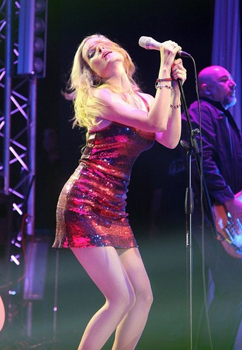 Cantante Nicole presentando en vivo su música en enero de 2012.